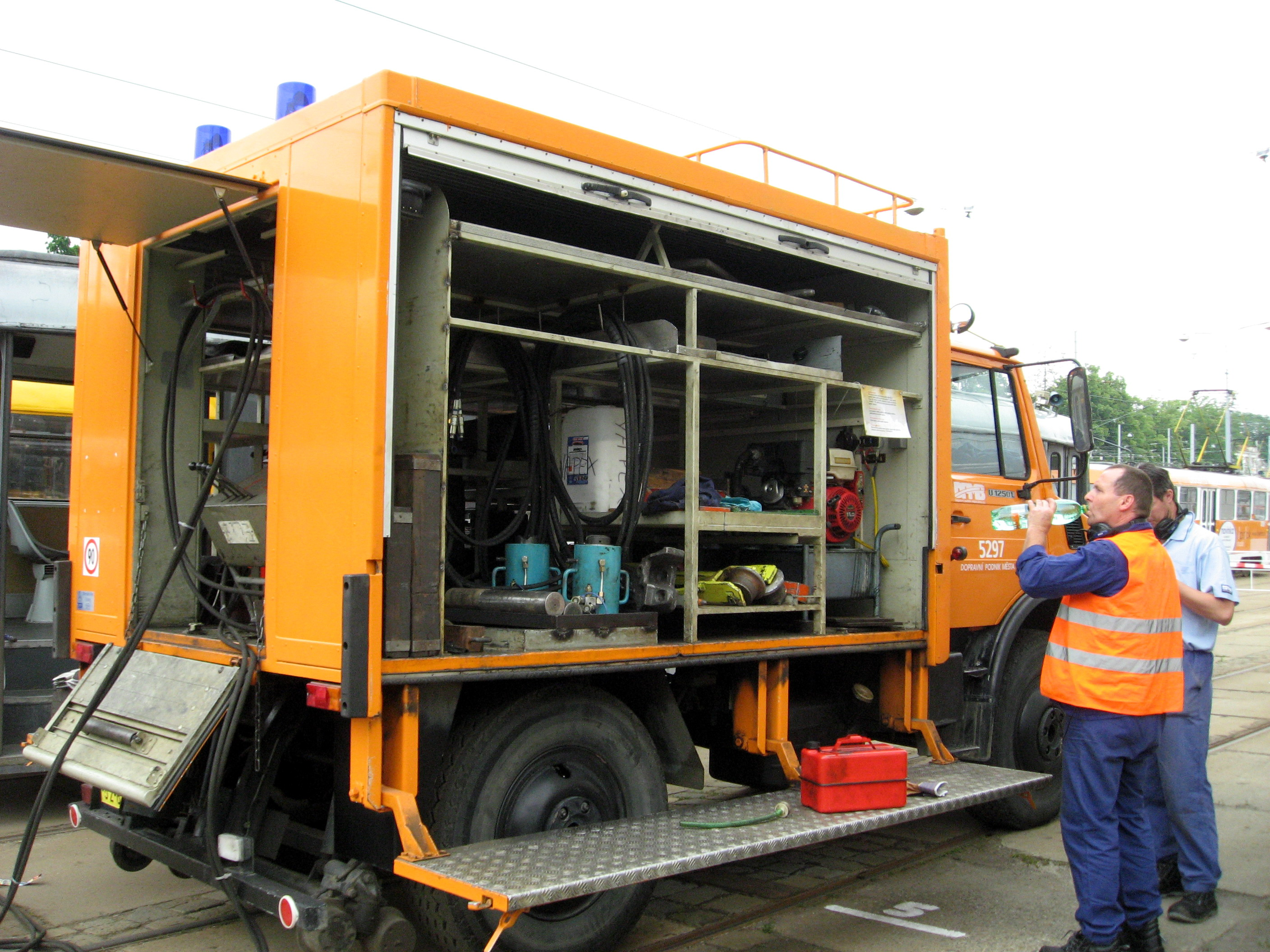 Vůz číslo 5297 v Pisárkách